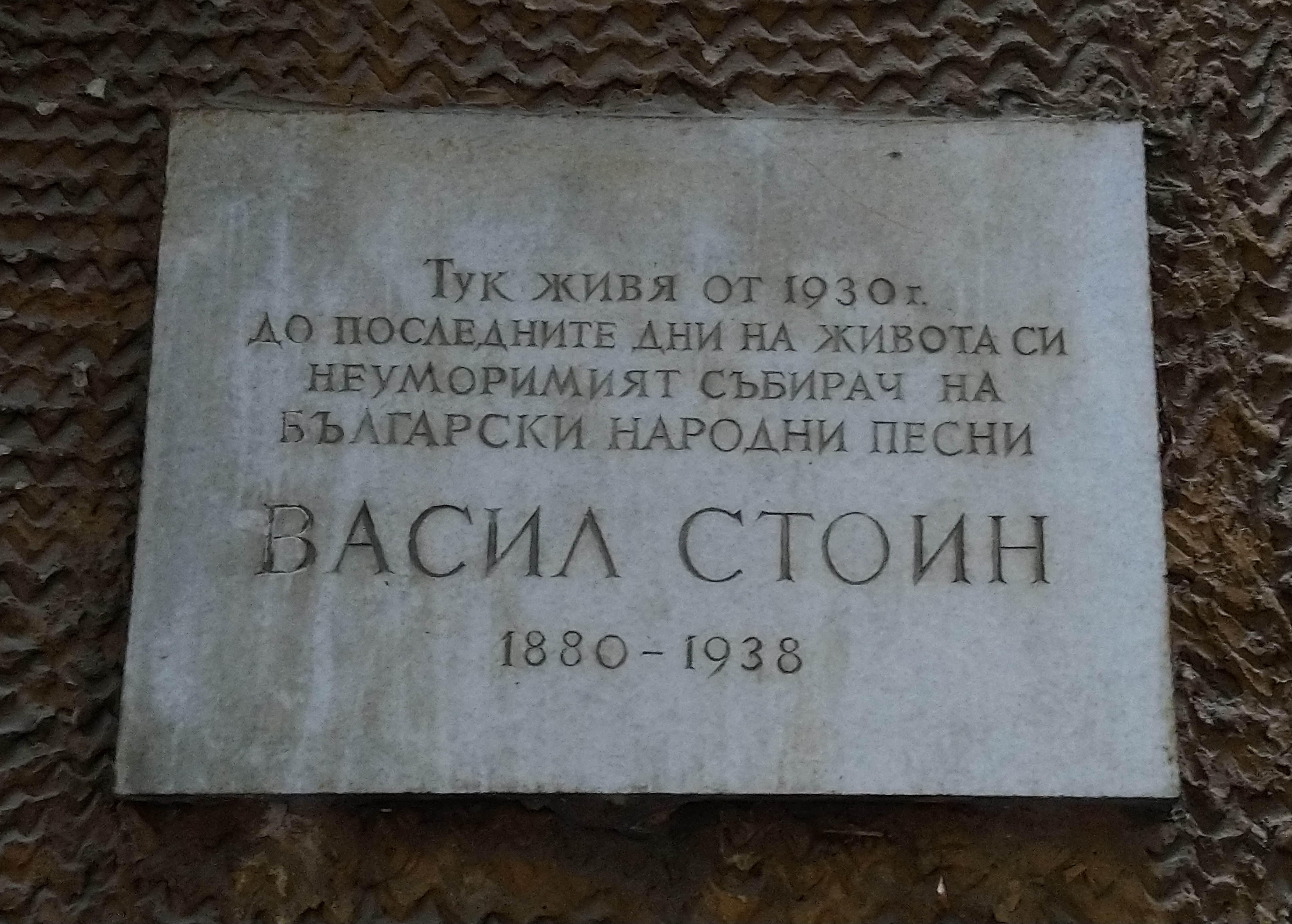 Паметна плоча на Васил Стоин, ул. Любен Каравелов 60, София